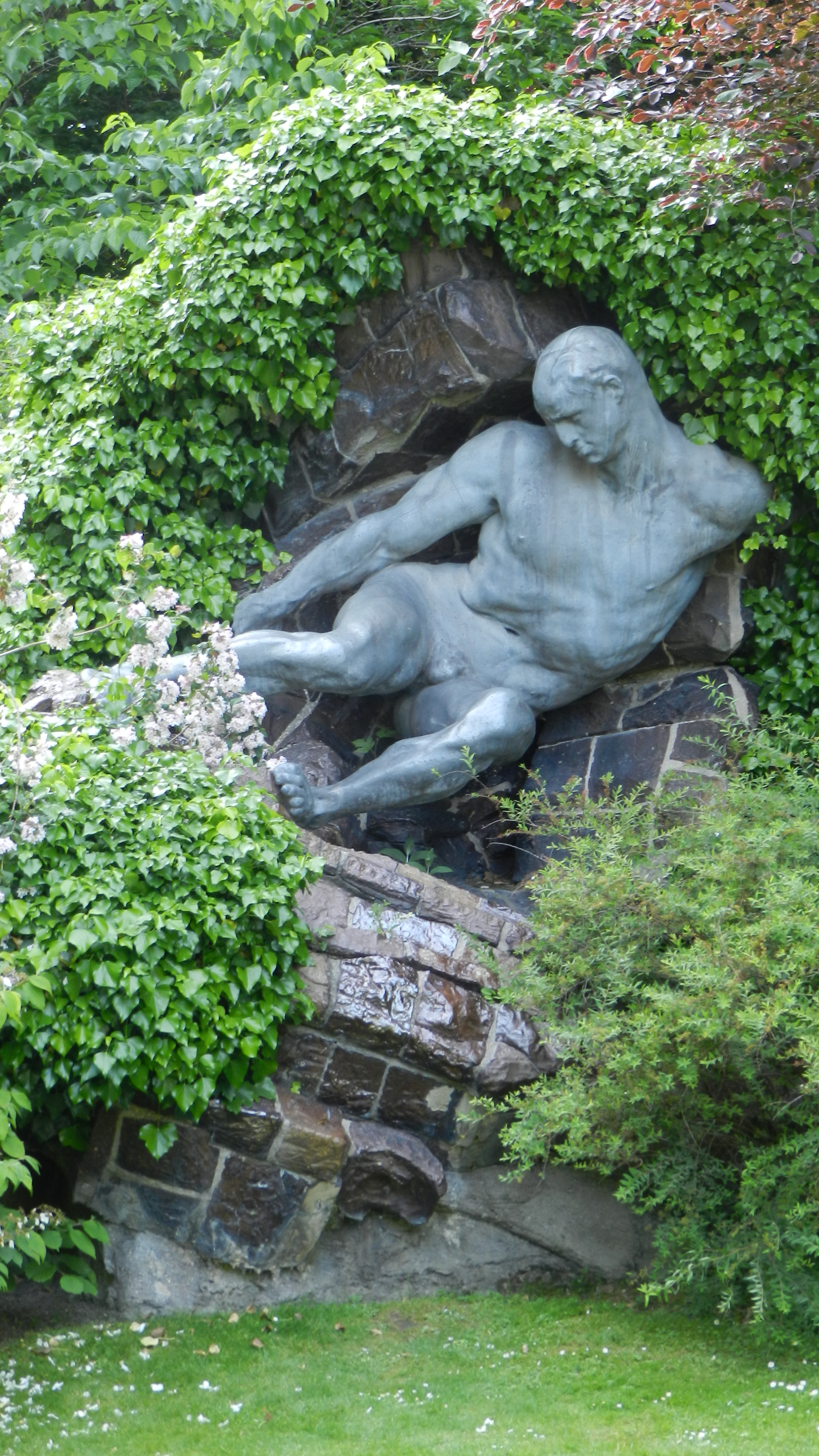 L'Effort by Pierre Roche, Jardin du Luxembourg, Paris.